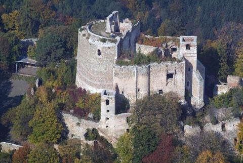 Ruine Landsee in Markt St. Martin, Austria, Luftaufnahme (aerialphotography) aus dem Süden: links Donjon, mitte Wohnturm, rechts Kapellenturm. Links Außenhof